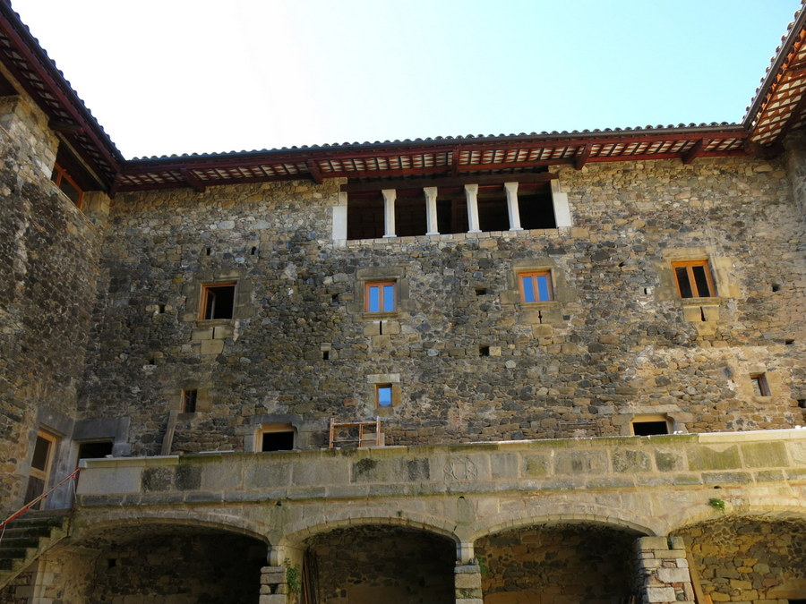 castell de Cartellà (Sant Gregori) a la comarca del Gironès